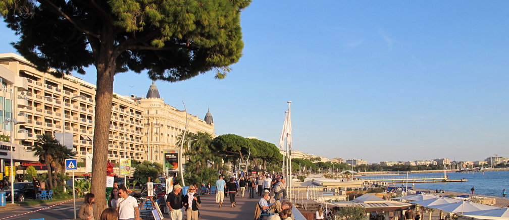 La Croisette, Cannes, France